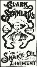 Clark Stanley's Snake Oil Liniment. Before en:1920.